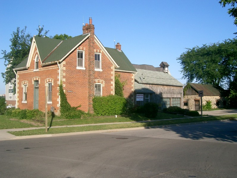 Mississauga, zachowane zabudowania starej farmy w dzielnicy Dixi